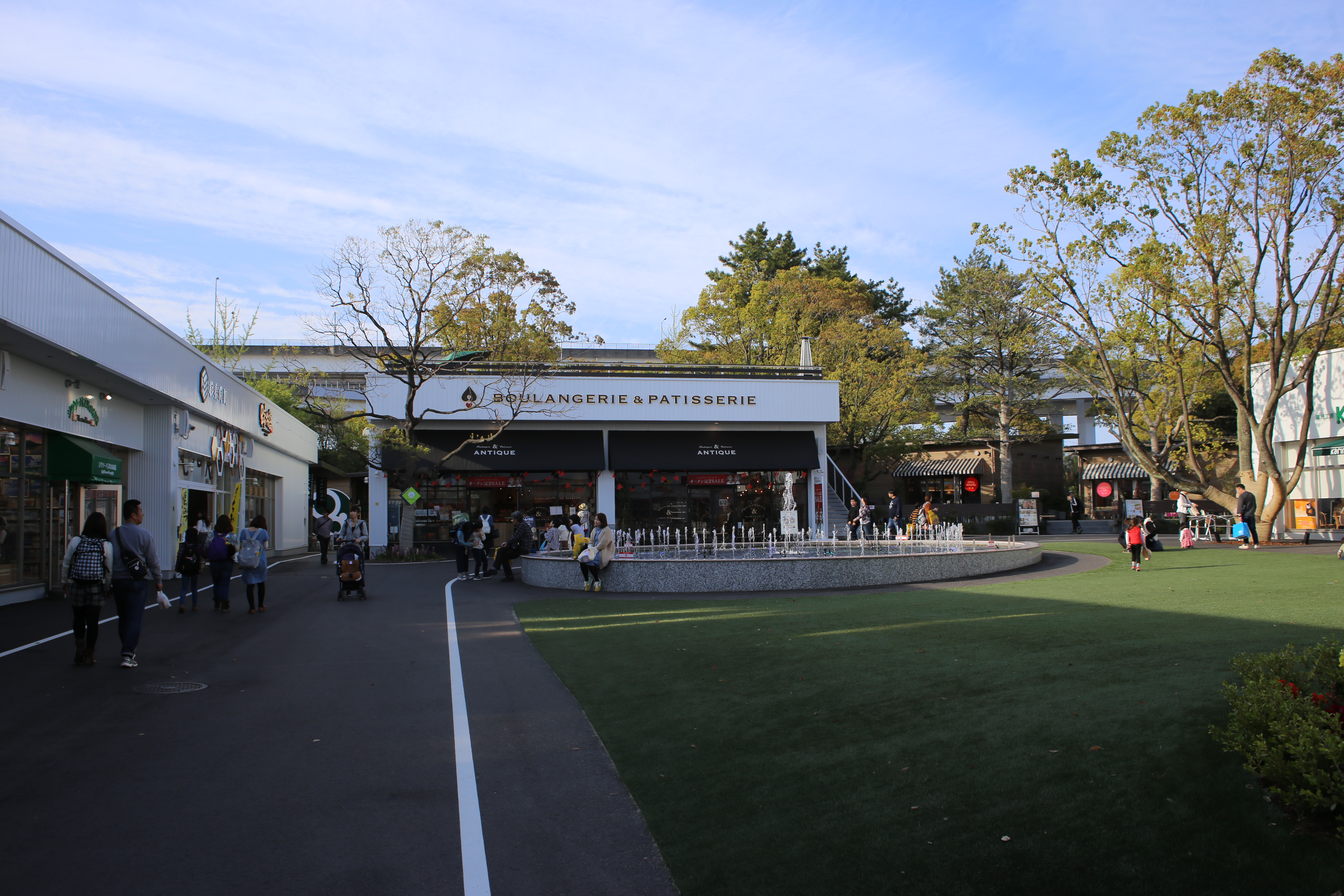 名古屋市港区金城ふ頭のメイカーズピア